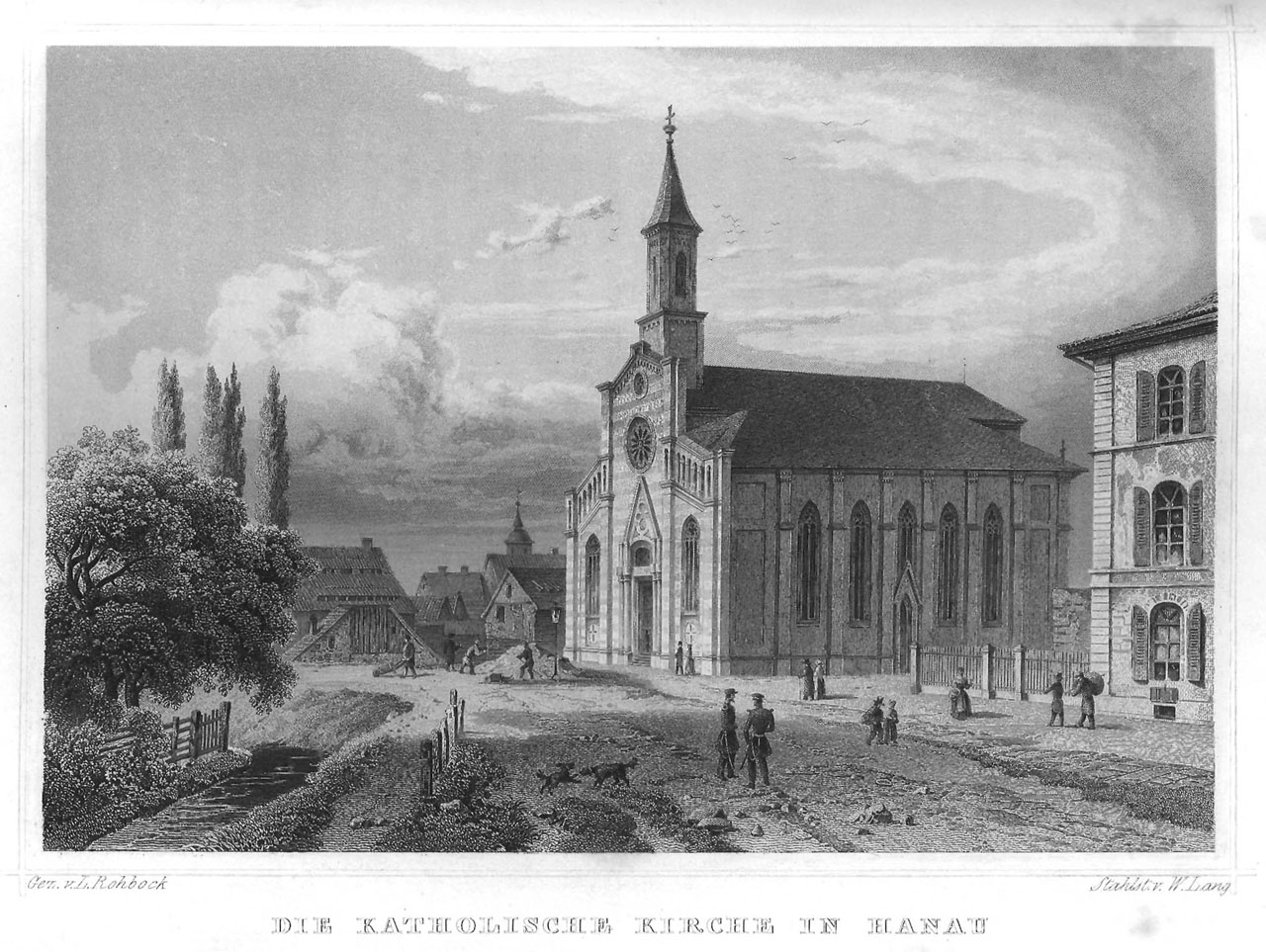 Ansicht der katholischen Kirche im Bangert